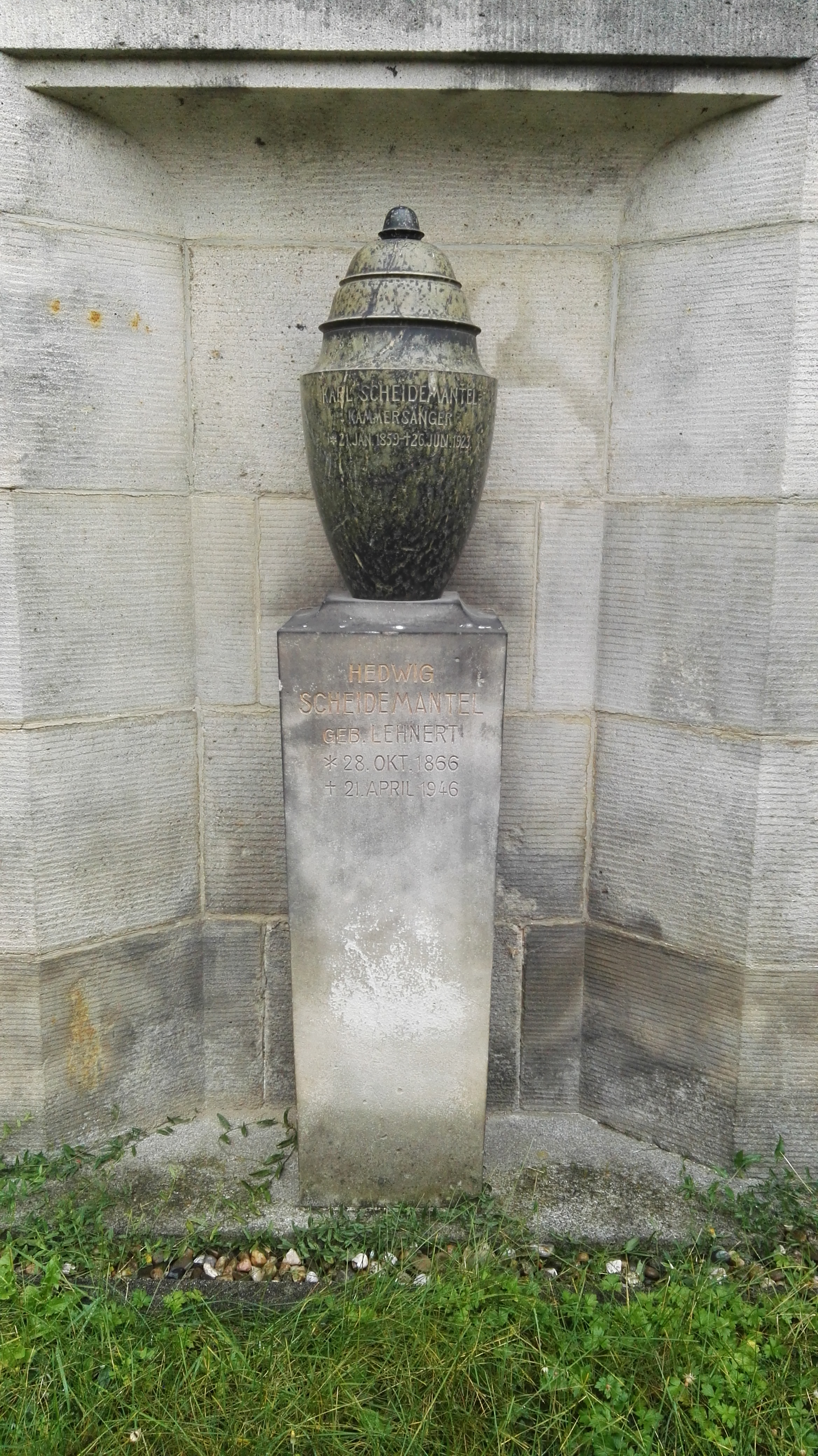 Grab des Opernsängers, -regisseurs und -direktors Karl Scheidemantel auf dem Urnenhain Tolkewitz in Dresden